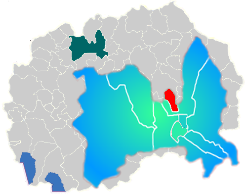 Mapa de la Municipalidad de Šuto Orizari.